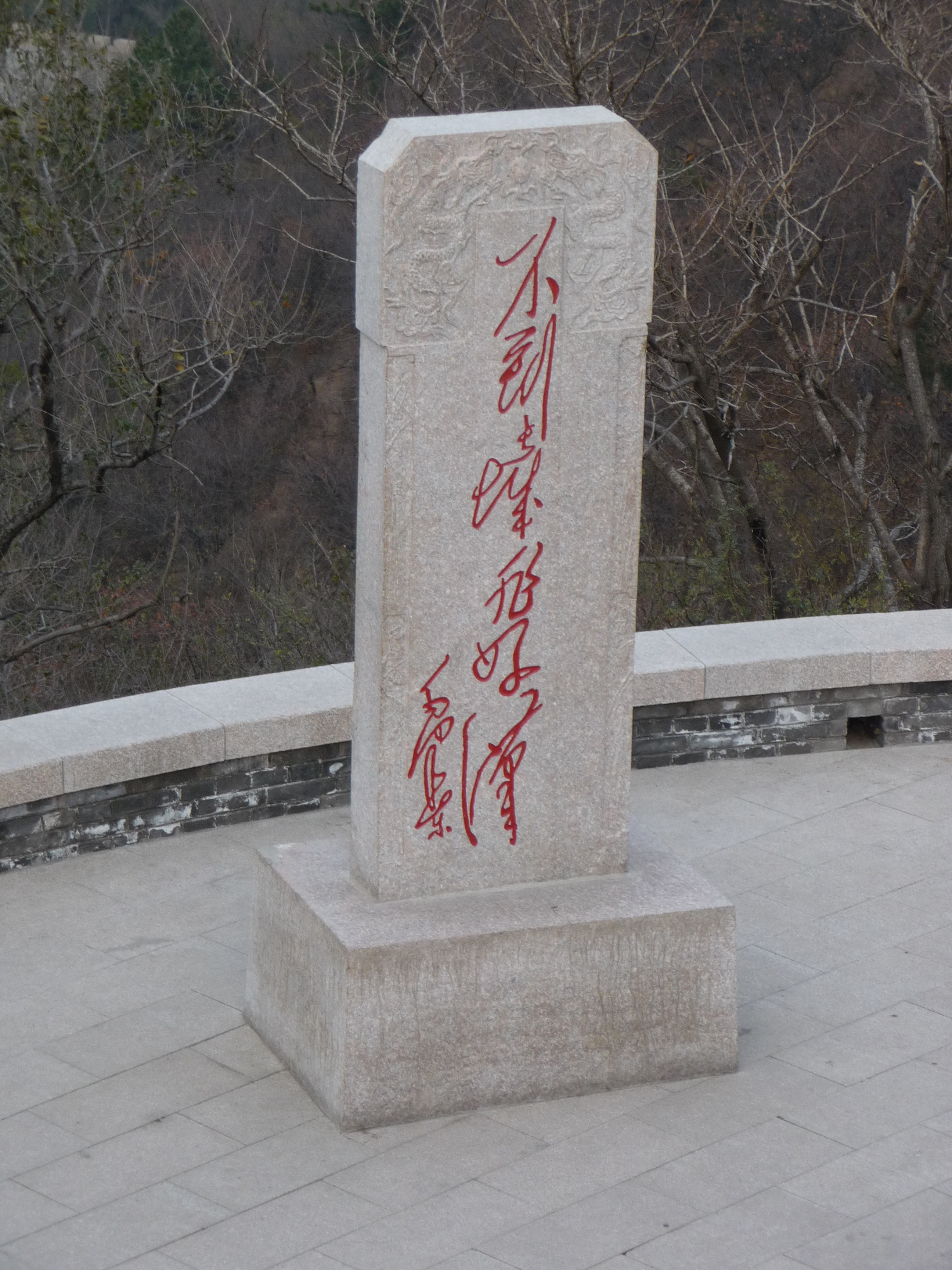 Mao-Zitat an der Großen Mauer